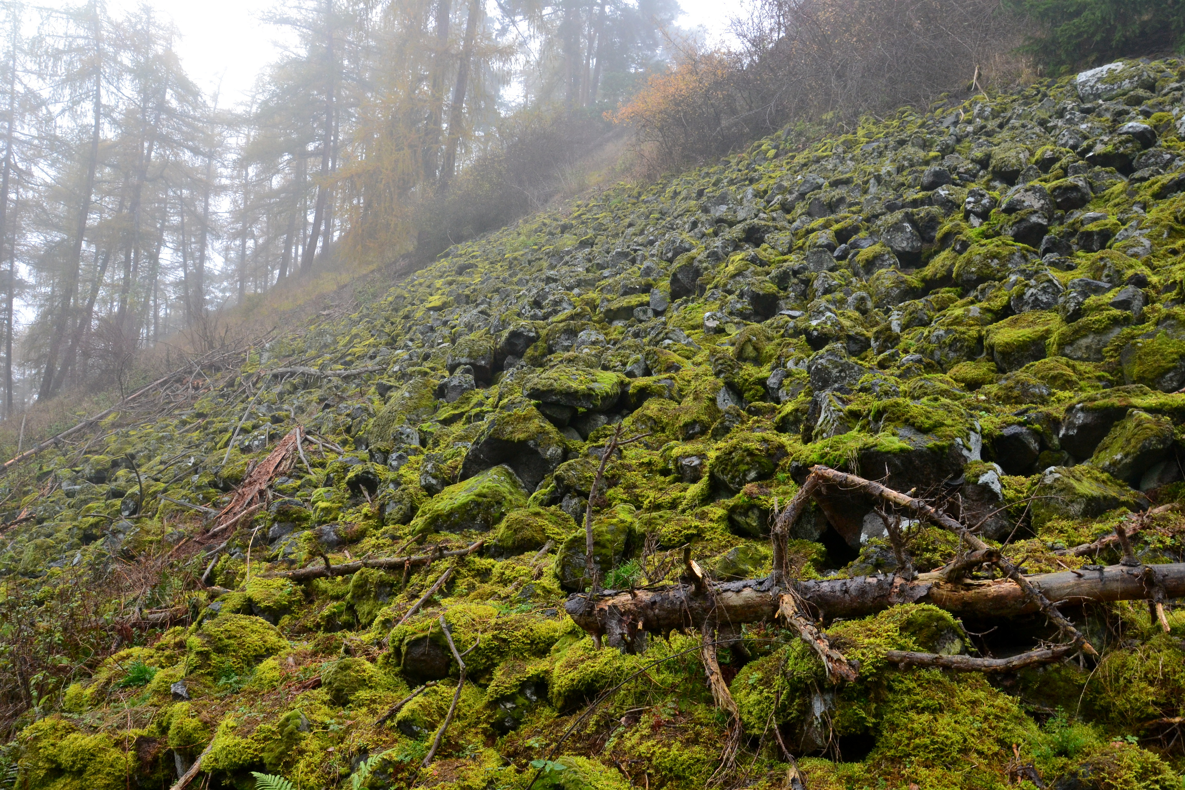 Špičák (611 m) - kamenné moře pod vrcholem